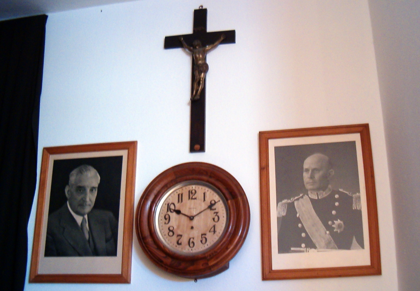 Обов'язкові елементи початкових шкіл часів Нової держави (Португалія): портрет Салазара, хрест Розп'яття і портрет Америку Томаша. Фотографія зроблена в Пеніші